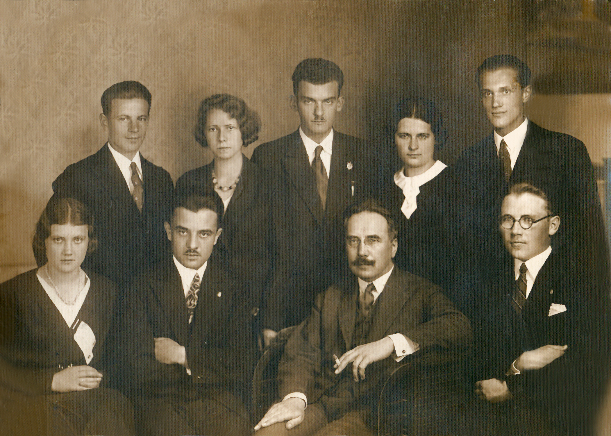 Stowarzyszenie Koła Rzeszowiaków. Po prawej siedzi Tadeusz Dyło i Stanisław Kot.